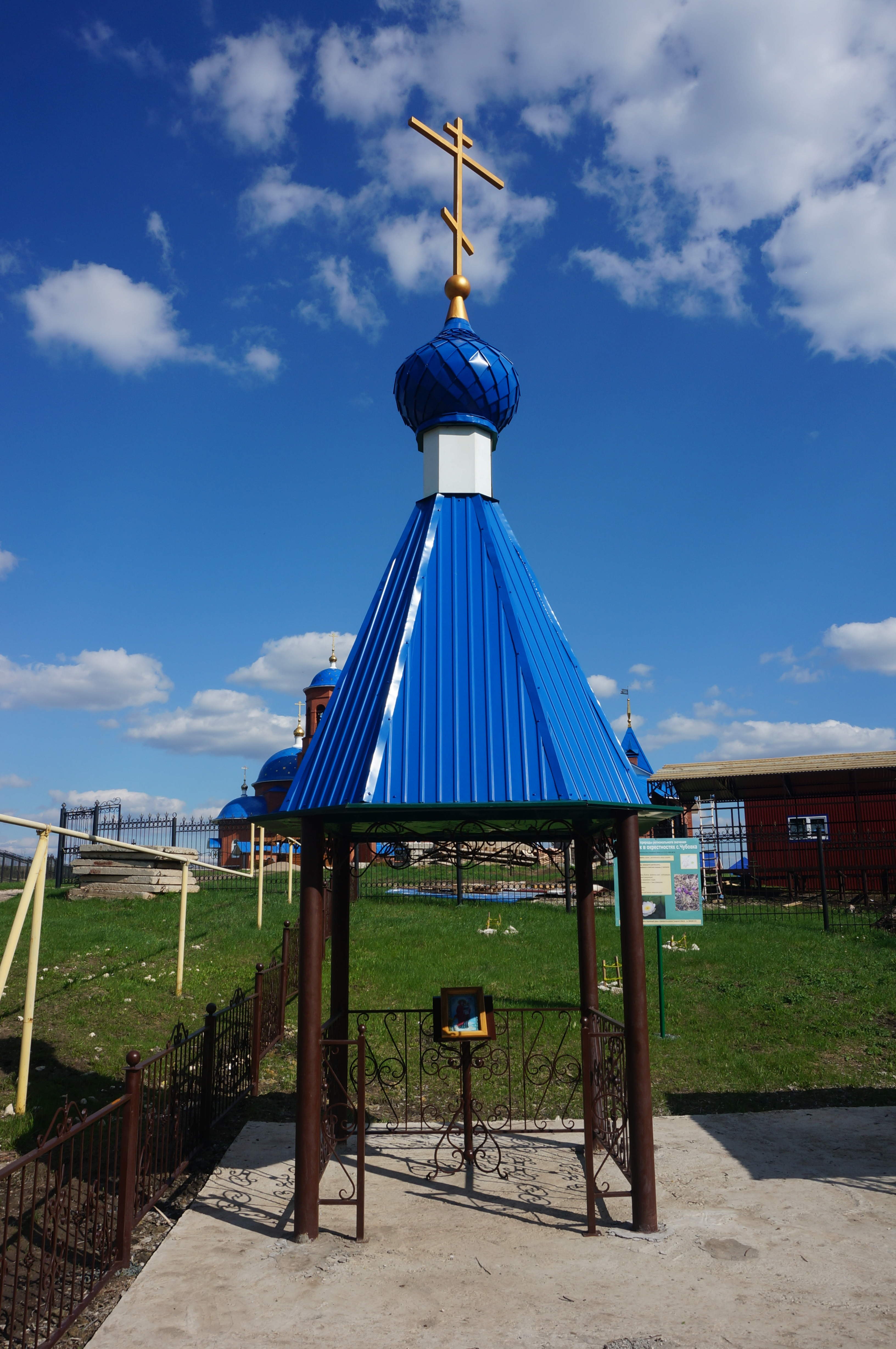 Родник в окрестностях с. Чубовка, Кинельский район Самарской области This image is related to the protected area of Russia number 6310840